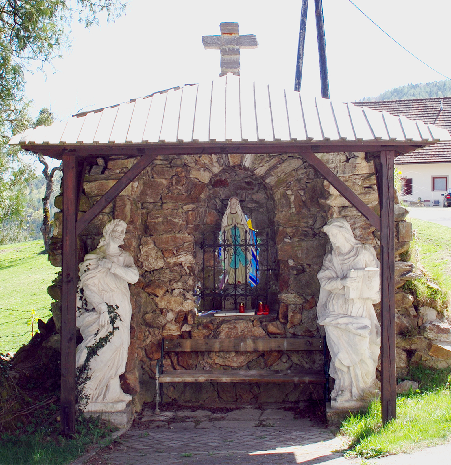 Marhof Rachling Höllerhanslgrotte, Weststeiermark